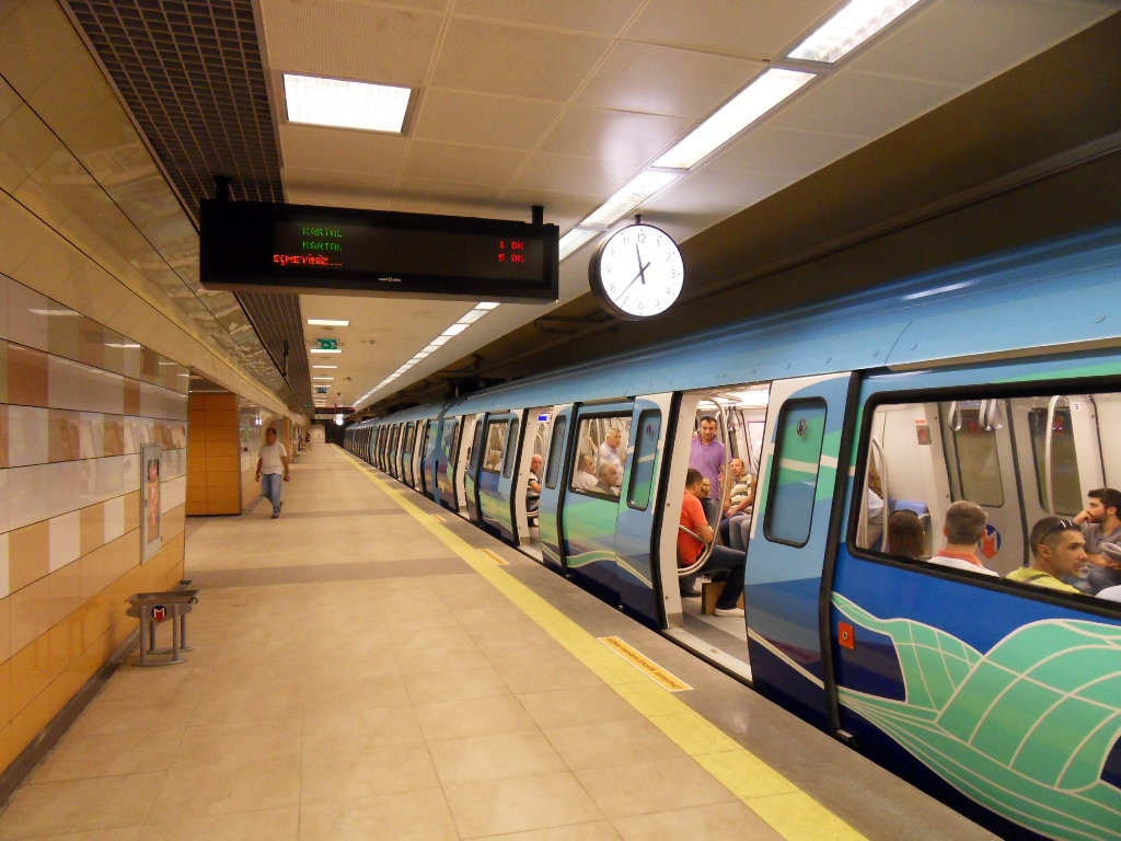 Yenisahra istasyonu.